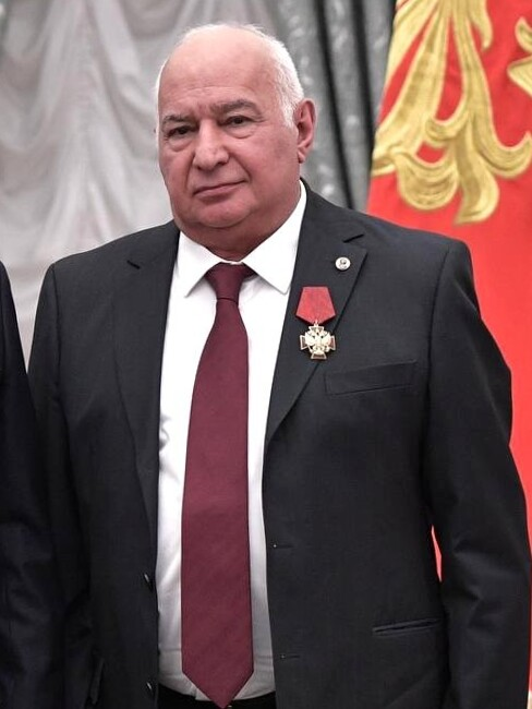 Михаил Давыдов на вручении ордена «За заслуги перед Отечеством» IV степени